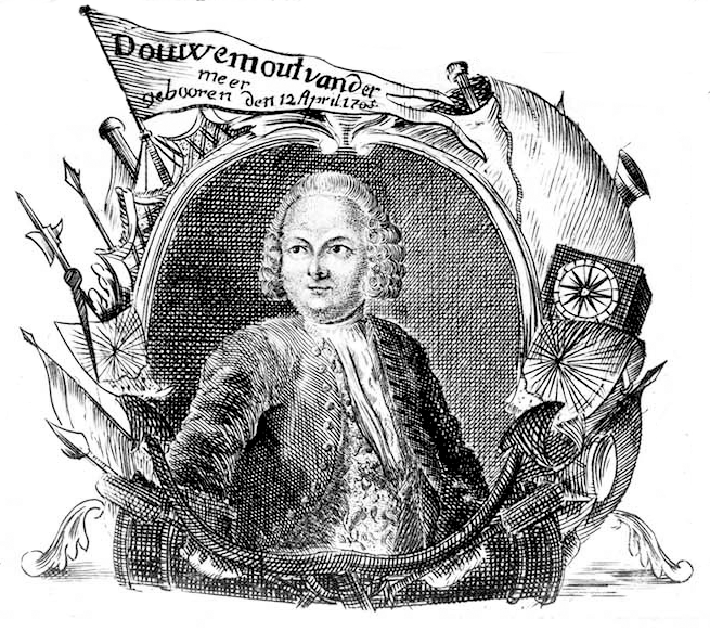 Douwe Mout van der Meer, owner of Clara